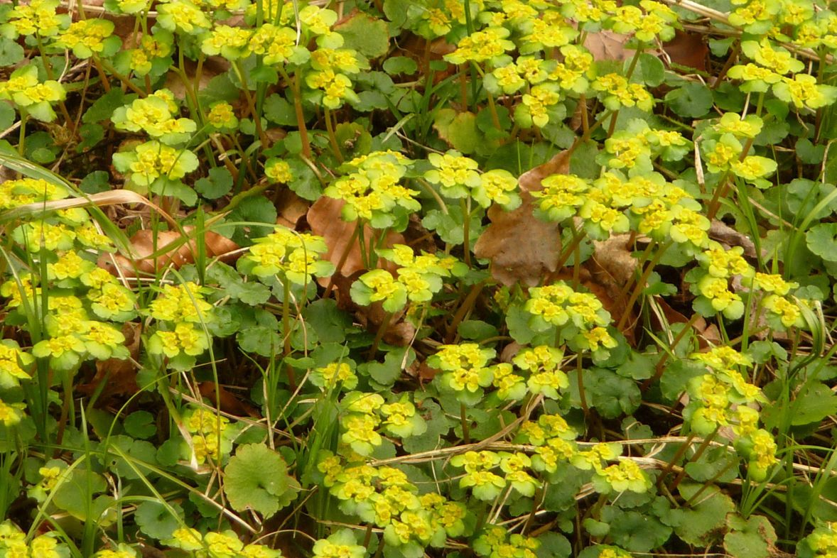 Wechselblättriges Milzkraut im Landschaftsschutzgebiet Kohlbruck